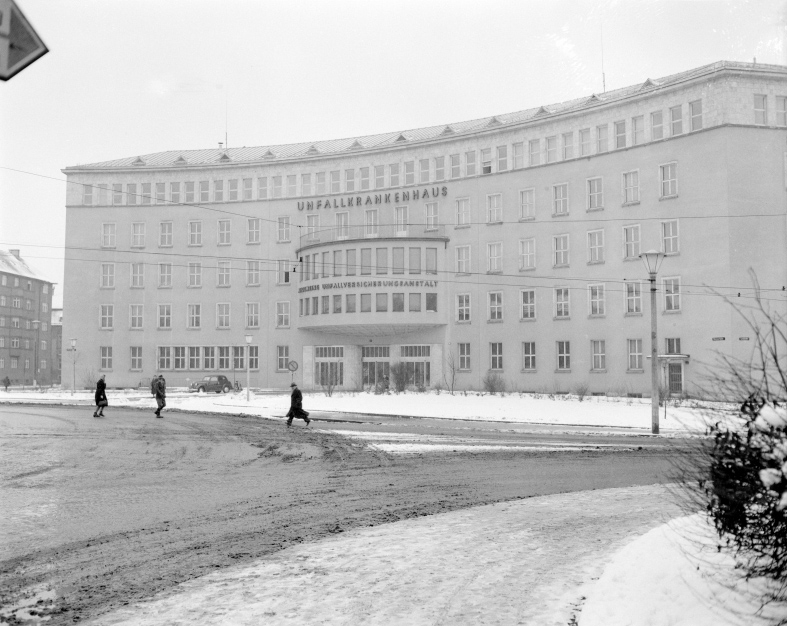 Unfallkrankenhaus Linz: Hauptfassade zum Blumauerplatz